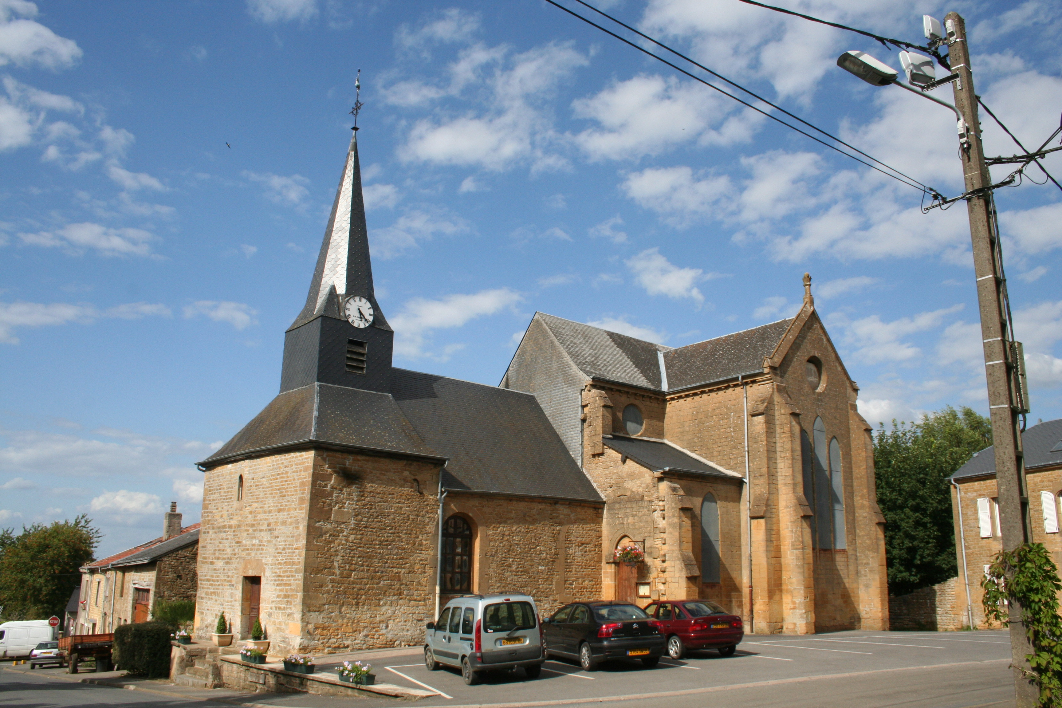 Village Ardennais